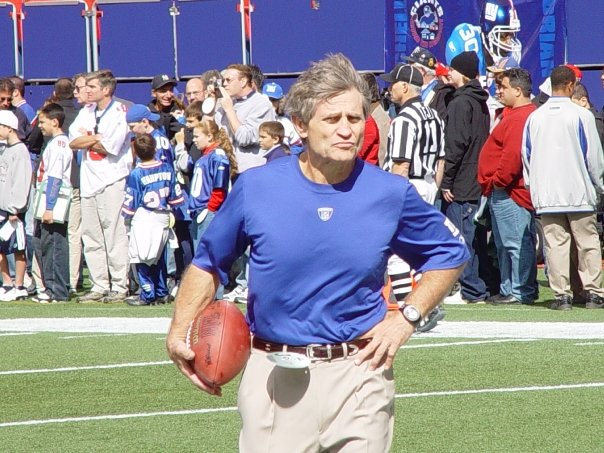 Coach McNally lors d'un Match avec les Giants de New York